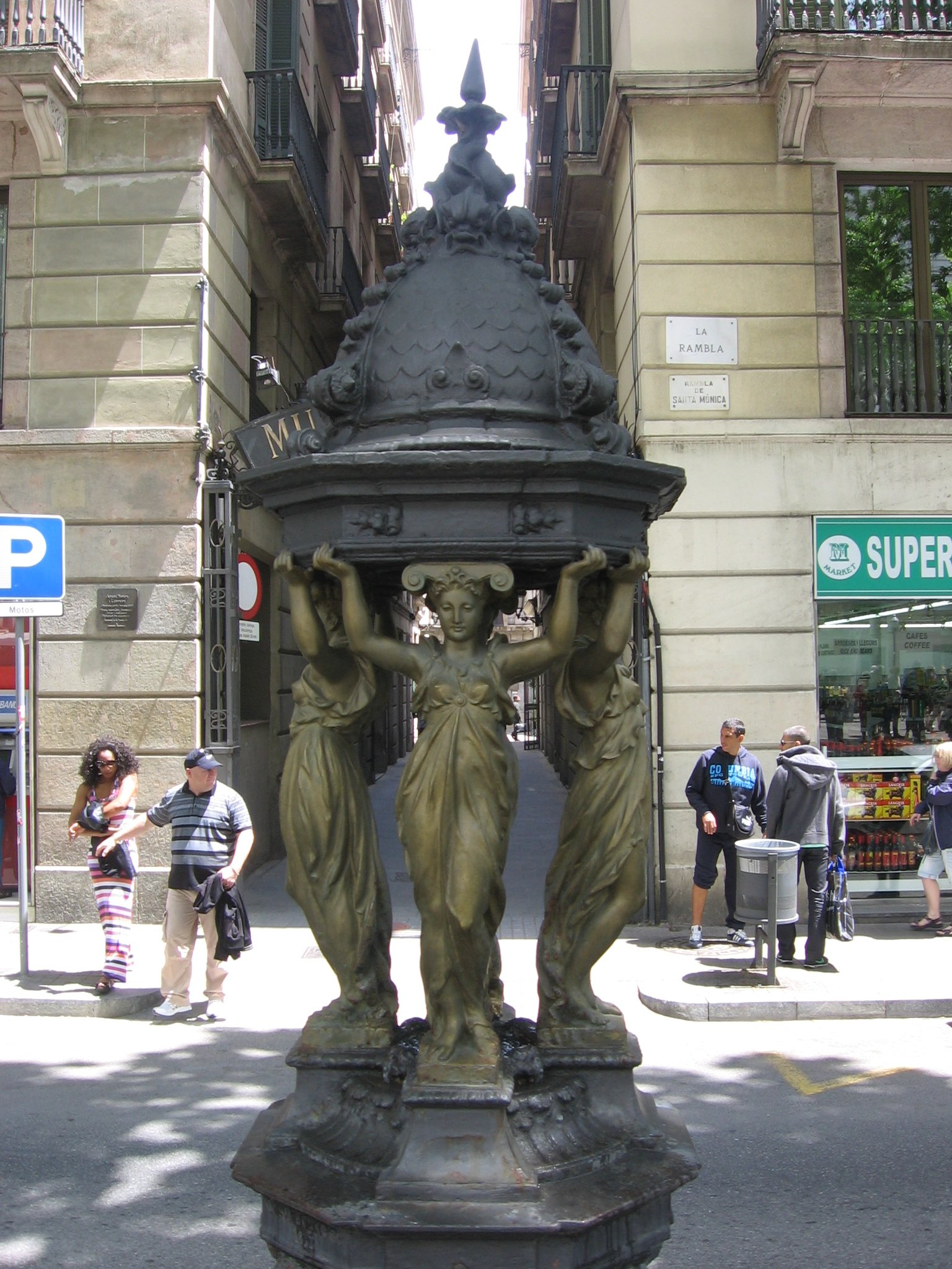 Fuente Wallace de la Rambla, Barcelona.